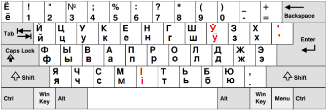 Windowsのベラルーシ語キーボード